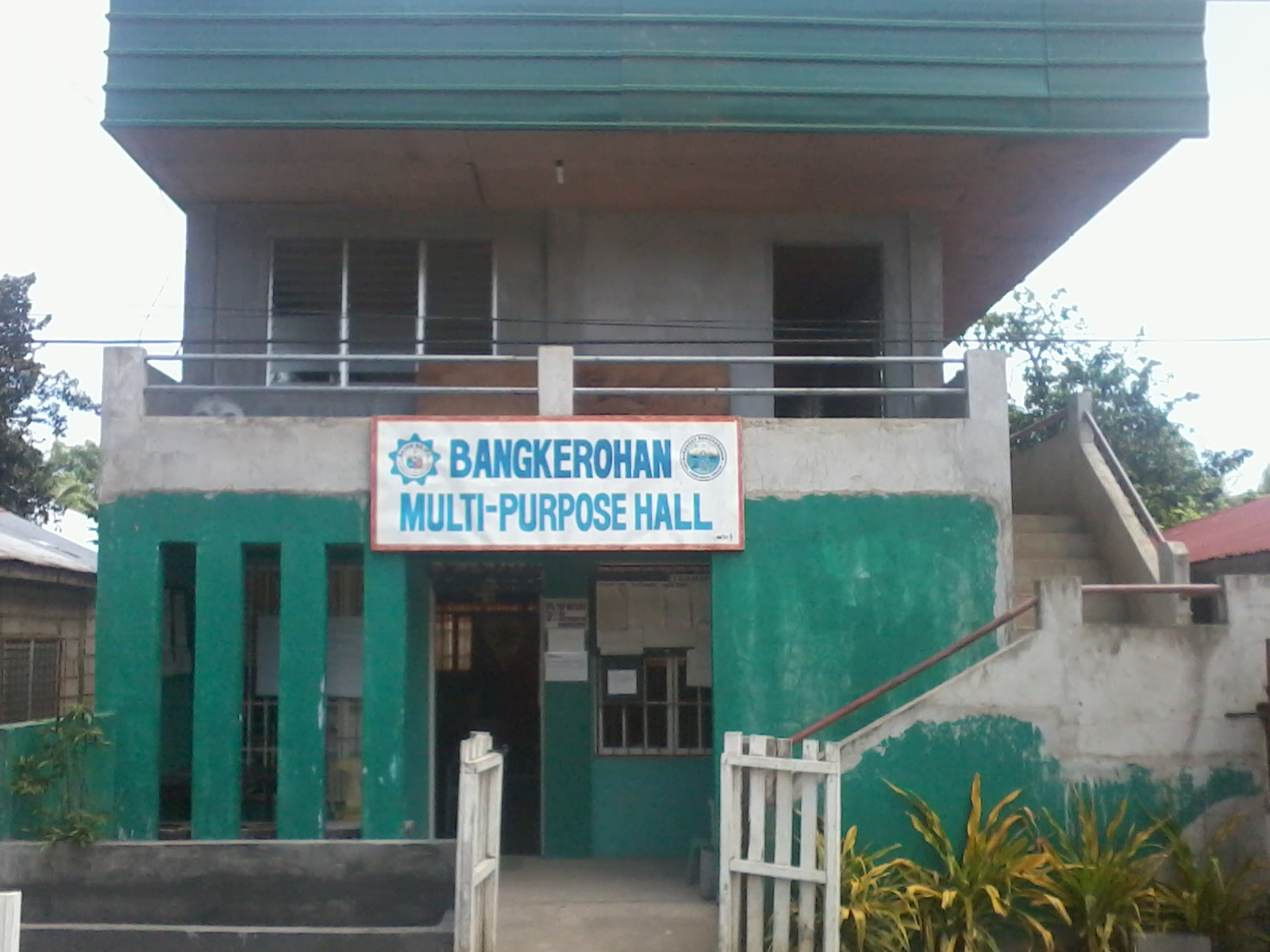 Bangkerohan Barangay Hall